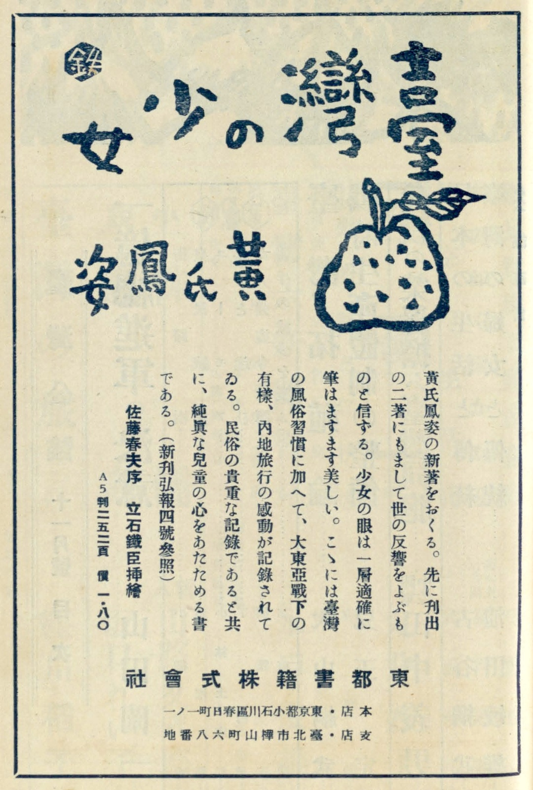 Bân-lâm-gú: 臺灣公論 téng-bīn ê N̂g Hōng-chu tì-chok kóng-kò